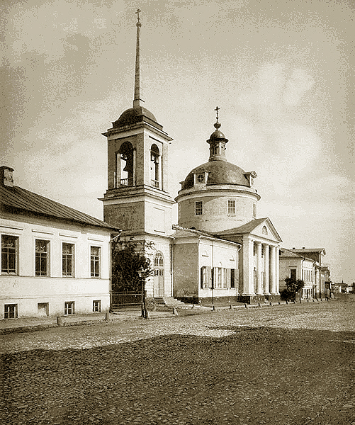 Церковь св. страстотерпцев Бориса и Глеба на Поварской. Фото из книги Н.А. Найденова "Москва. Соборы, монастыри и церкви". 1882-83гг.